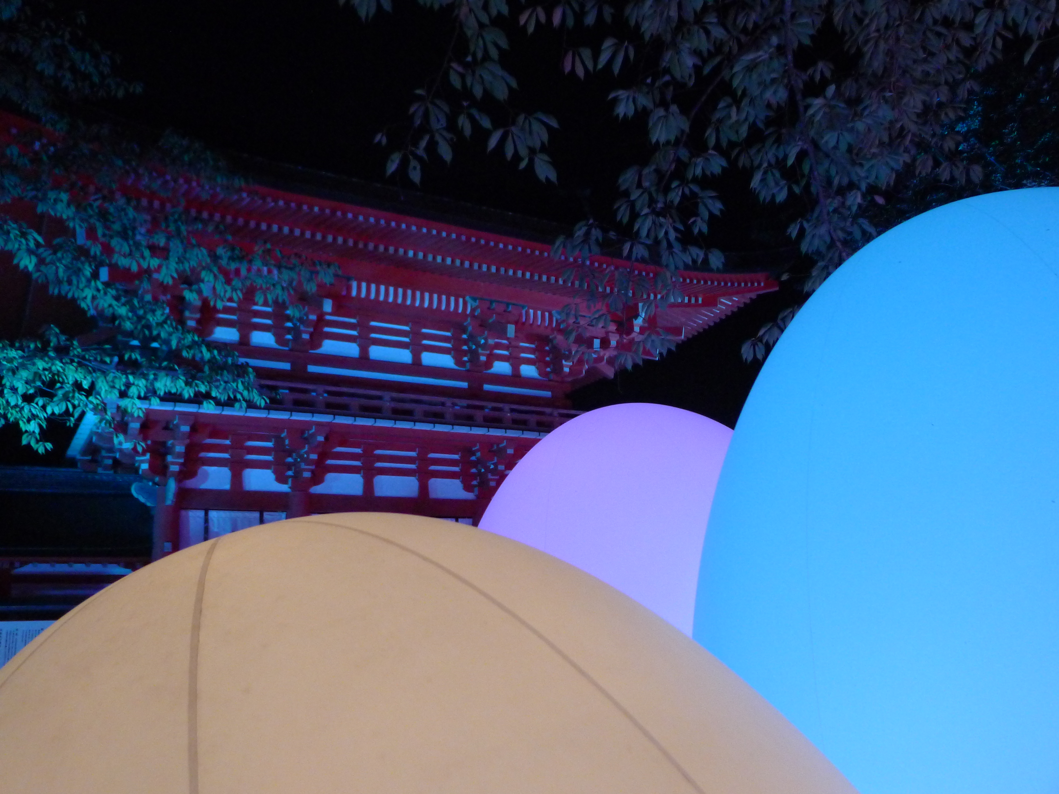 世界遺産・下鴨神社 糺の森の光の祭「TOKIO インカラミ」。主催者により撮影・公開自由。